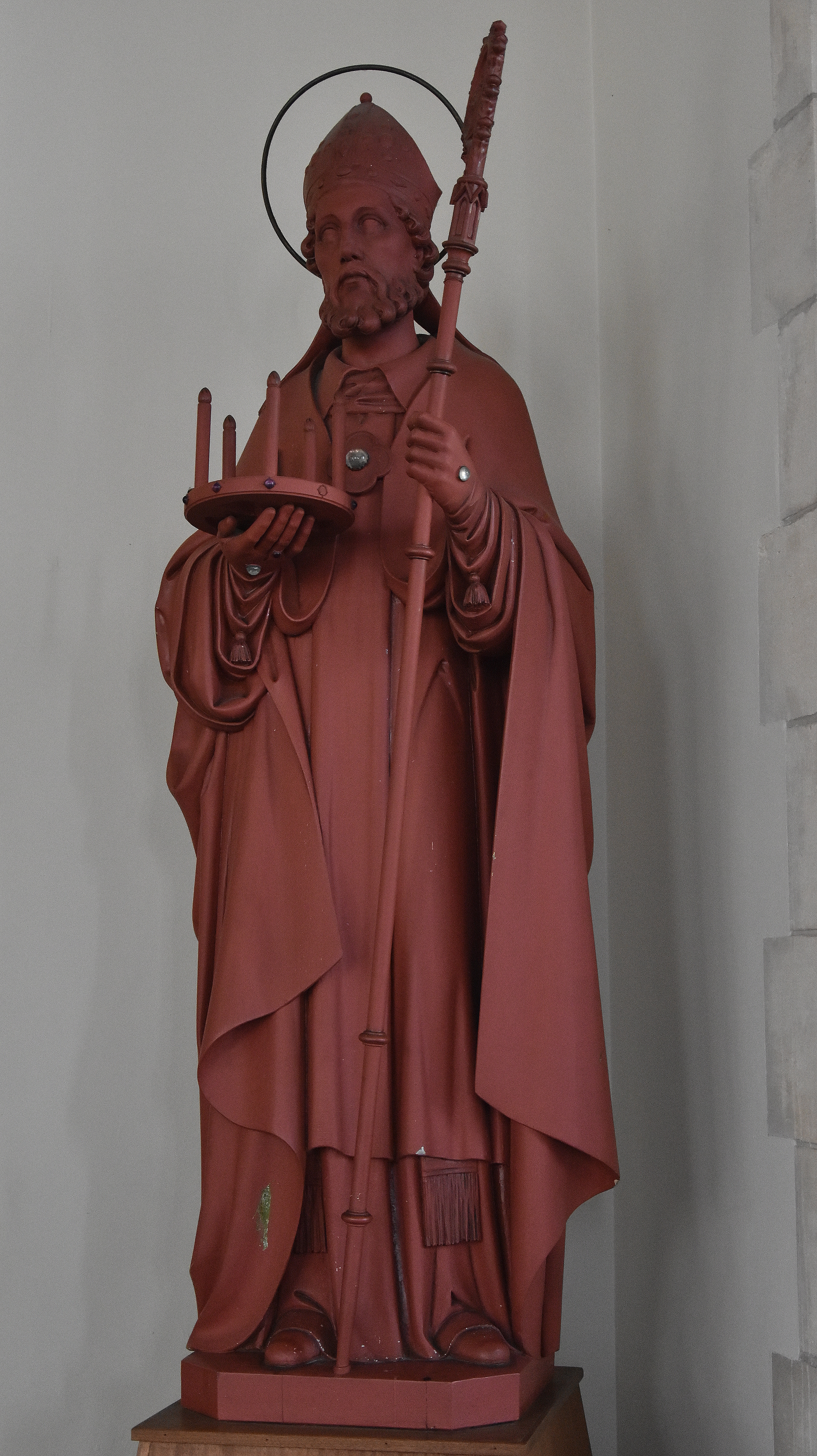 Donatianus van Reims - Sint-Donatuskerk (Zeebrugge) 25-06-2019